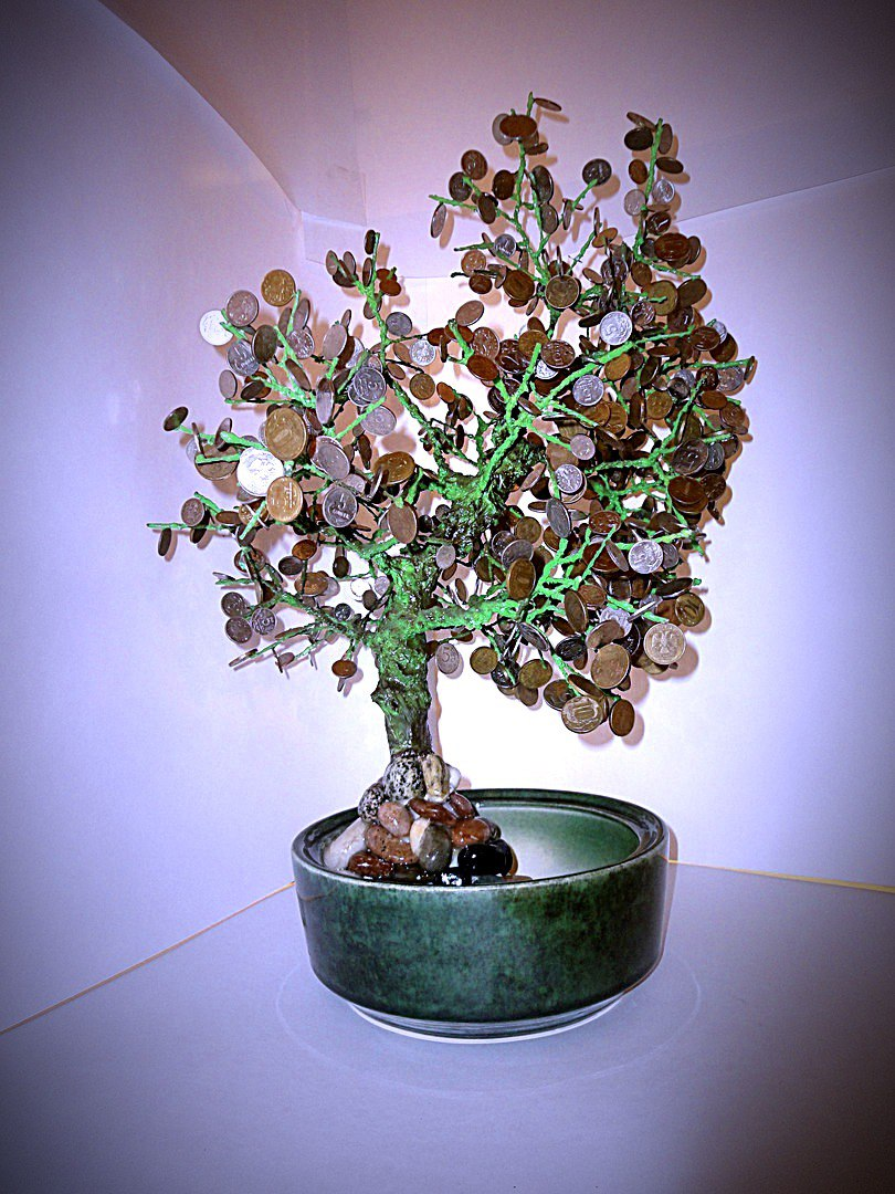 Магнитное дерево копилка